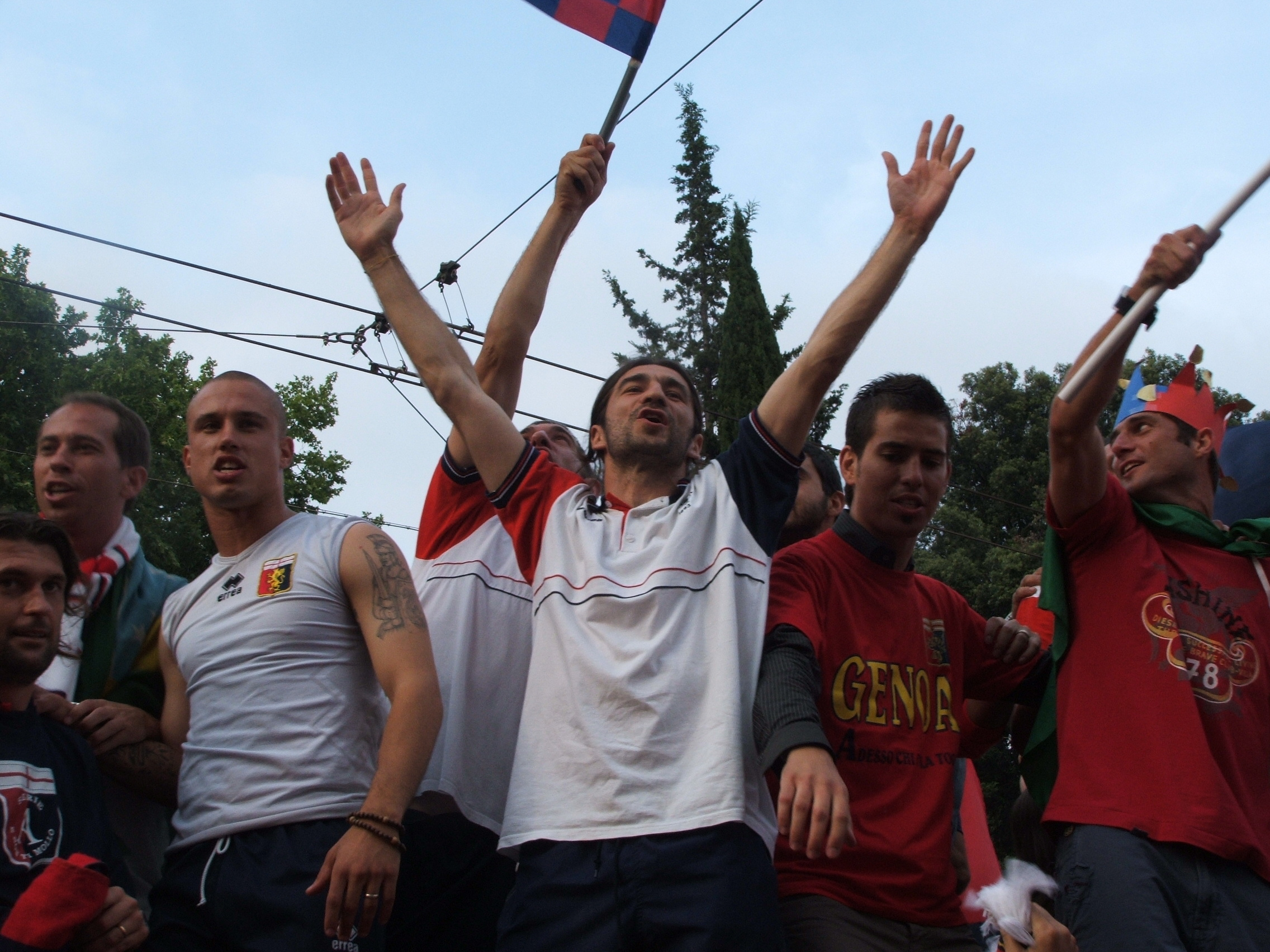 Genova, festeggiamenti per la promozione del Genoa CFC in Serie A